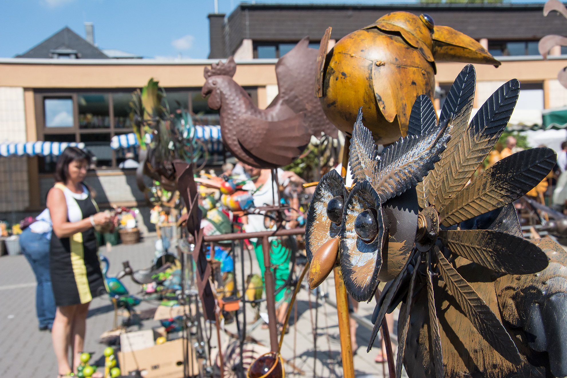 Bild vom Jahresfelder Markt 2016 in Straßenhaus